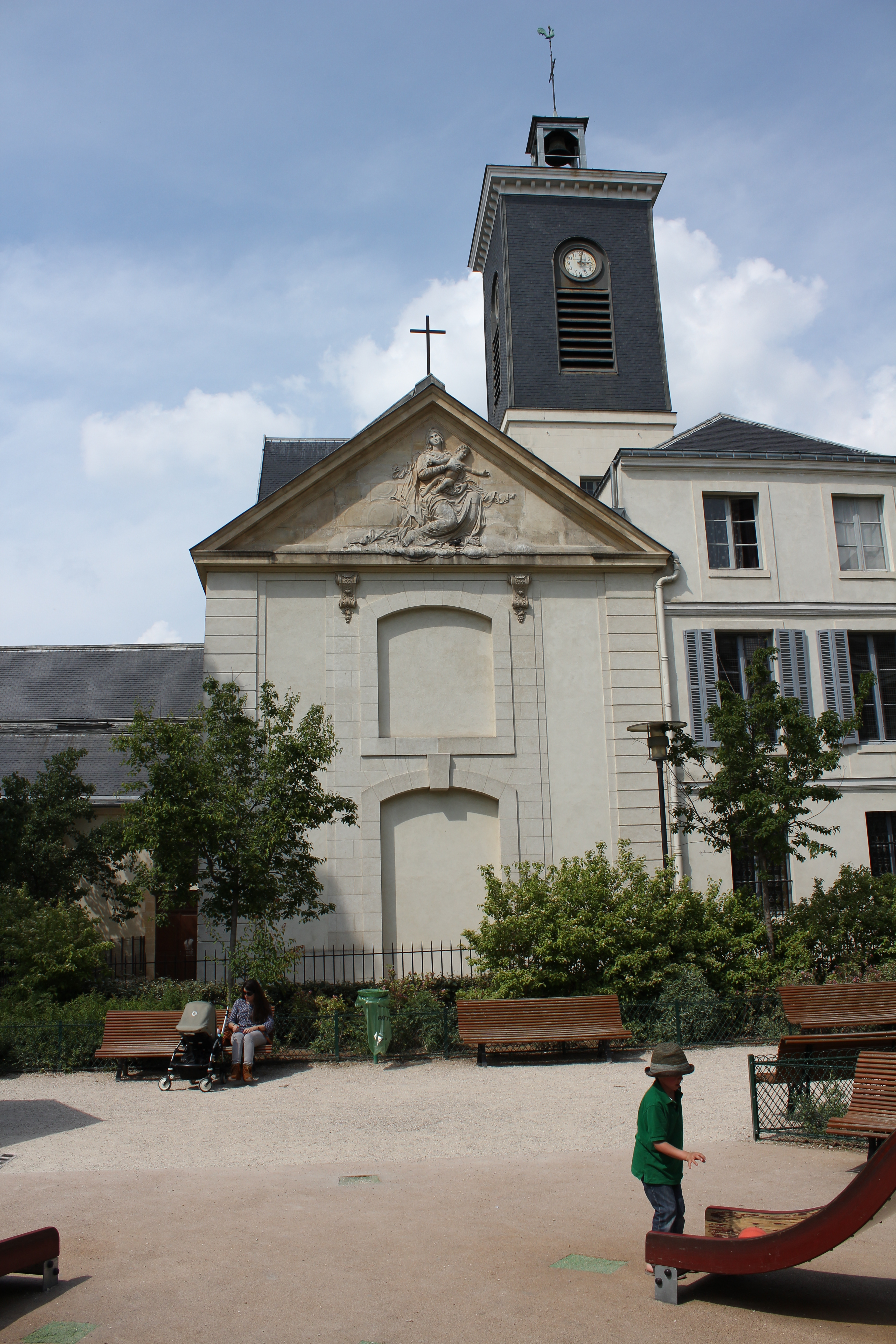 Église Sainte-Marguerite à Paris.